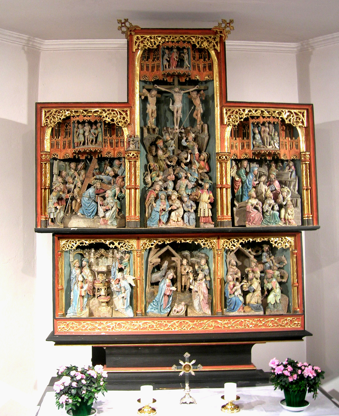 Retabel an der Kiirch vun Helzen